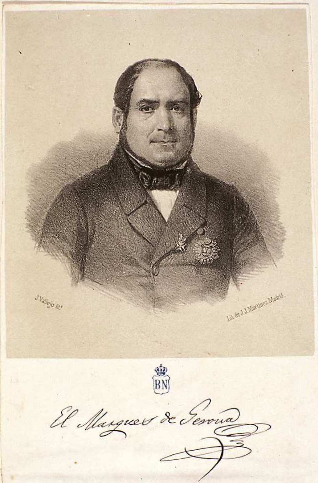 José de Castro y Orozco, litografía de José Vallejo y Galeazo. Facsímil del autógrafo: El marqués de Gerona. Biblioteca Nacional de España